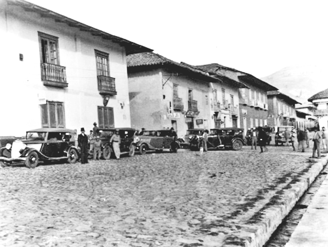 Año 1935, Plaza de Armas de Cajamarca. Foto perteneciente a la serie 'Cajamarca Tradicional', de la galería fotográfica de la web de la Municipalidad de Cajamarca Perú.